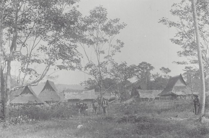 foto. Dorpsgezicht met militairen, Boven Singkil, Atjeh